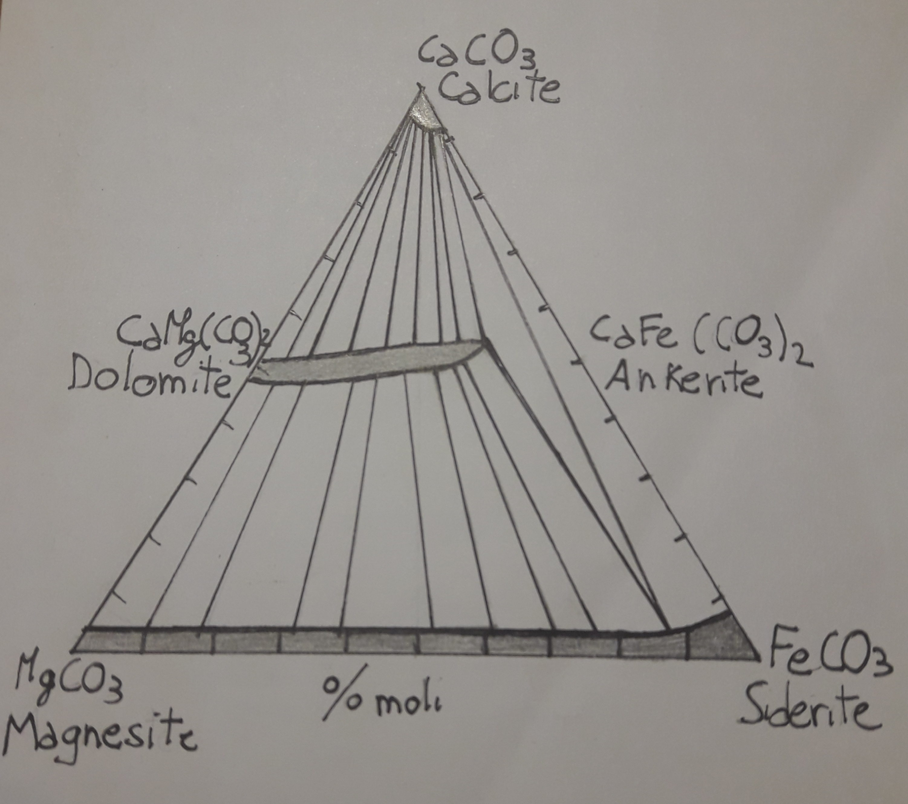 soluzioni solide dei carbonati nel sistema tra Ca-Mg-Fe-CO2